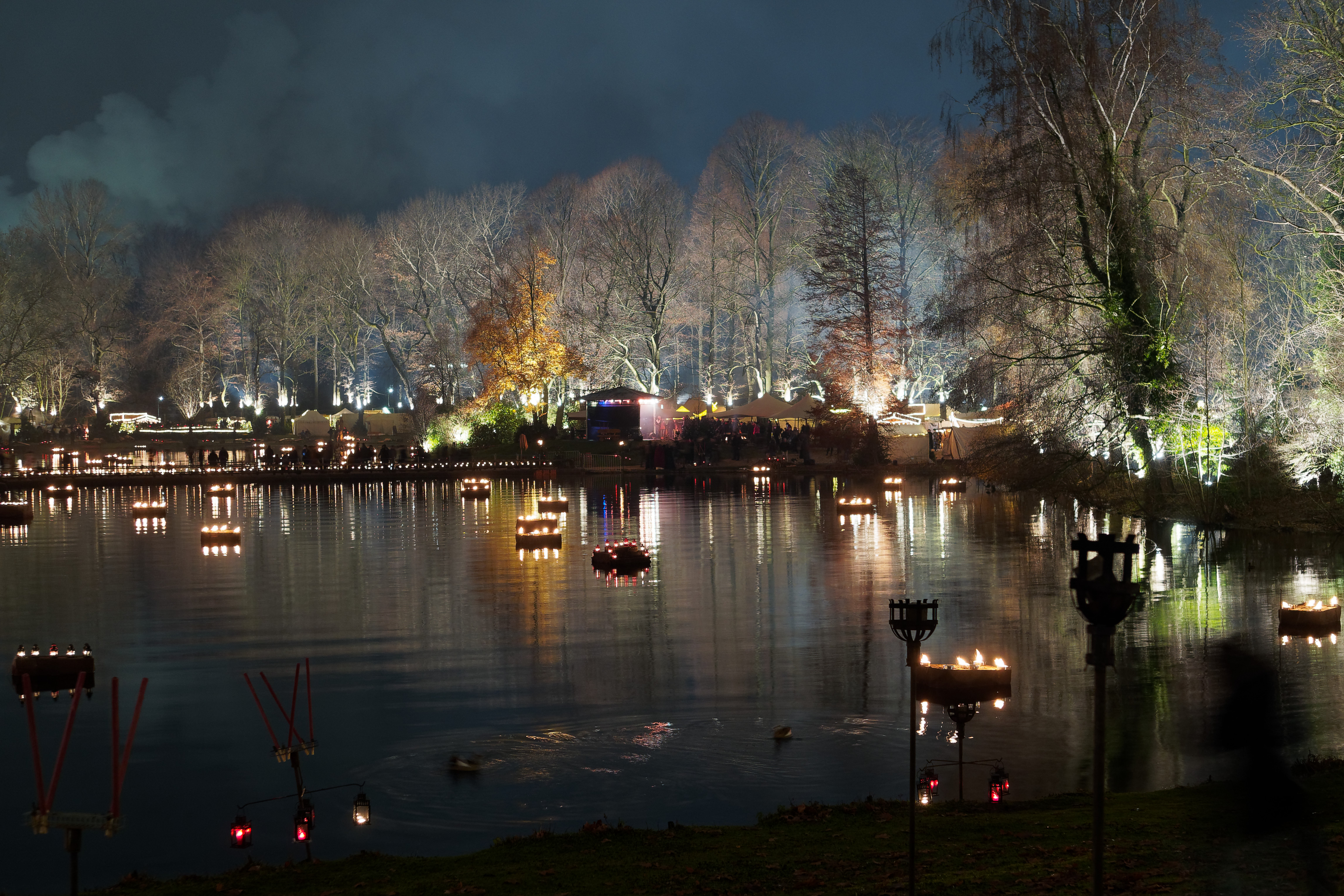 Dortmund-Fredenbaum, Mittelalter-Markt im Fredenbaumpark, Lichter am See